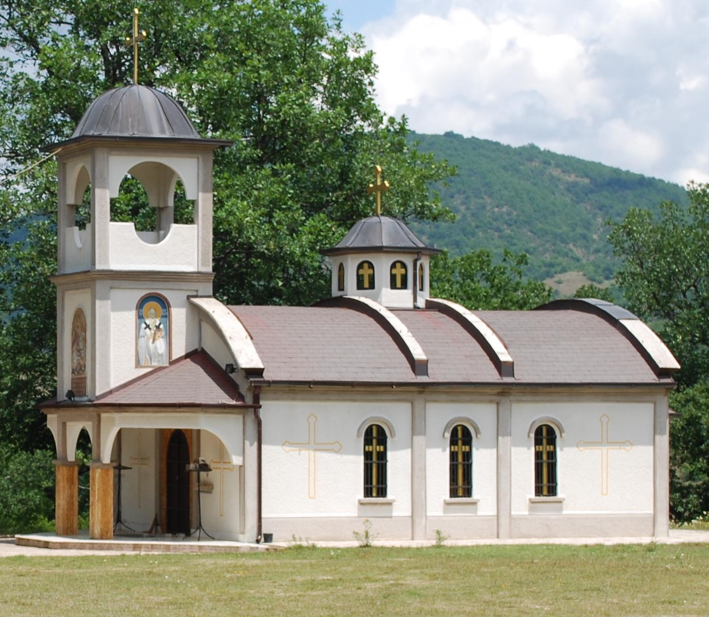 Манастирот „Св. Георги“ -Волковија, Тетово